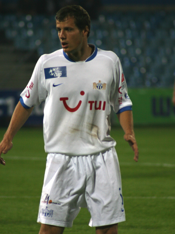 Xavier Margairaz, FCZ, Hardturm Stadion (Schweiz), Pokal Halbfinale, FC Zürich - FC Luzern 2:3